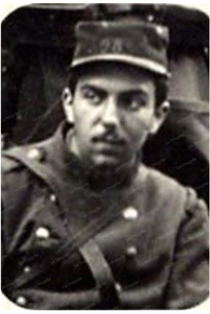 Jean Julien Marius Chapelant, né le 4 juin 1891 à Ampuis dans le Rhône , et mort le 11 octobre 1914 à Beuvraignes dans la Somme, est un sous-lieutenant français commandant la 3e section de mitrailleuses du 98e RI. Il est fusillé pour l’exemple le 11 octobre 1914.